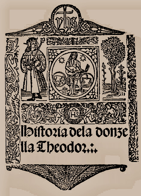 Portada de la Historia de la doncella Teodor (2ª mitad S. XIII)